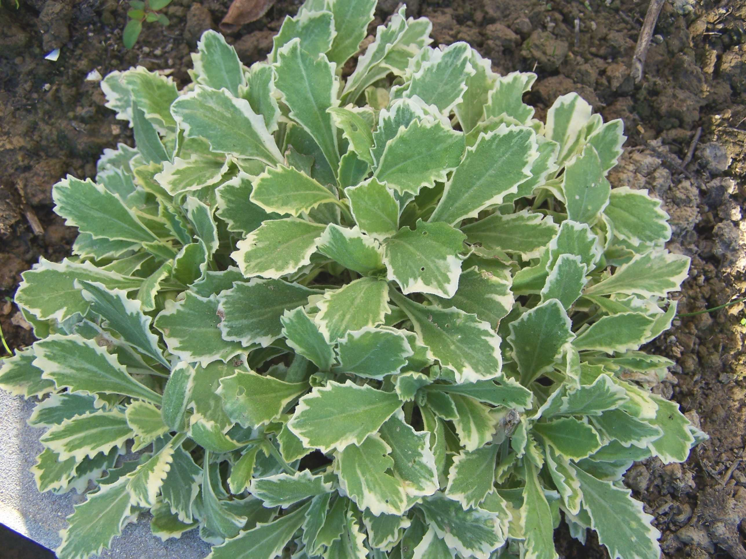 Arabis caucasica (pl. gęsiówka kaukaska)